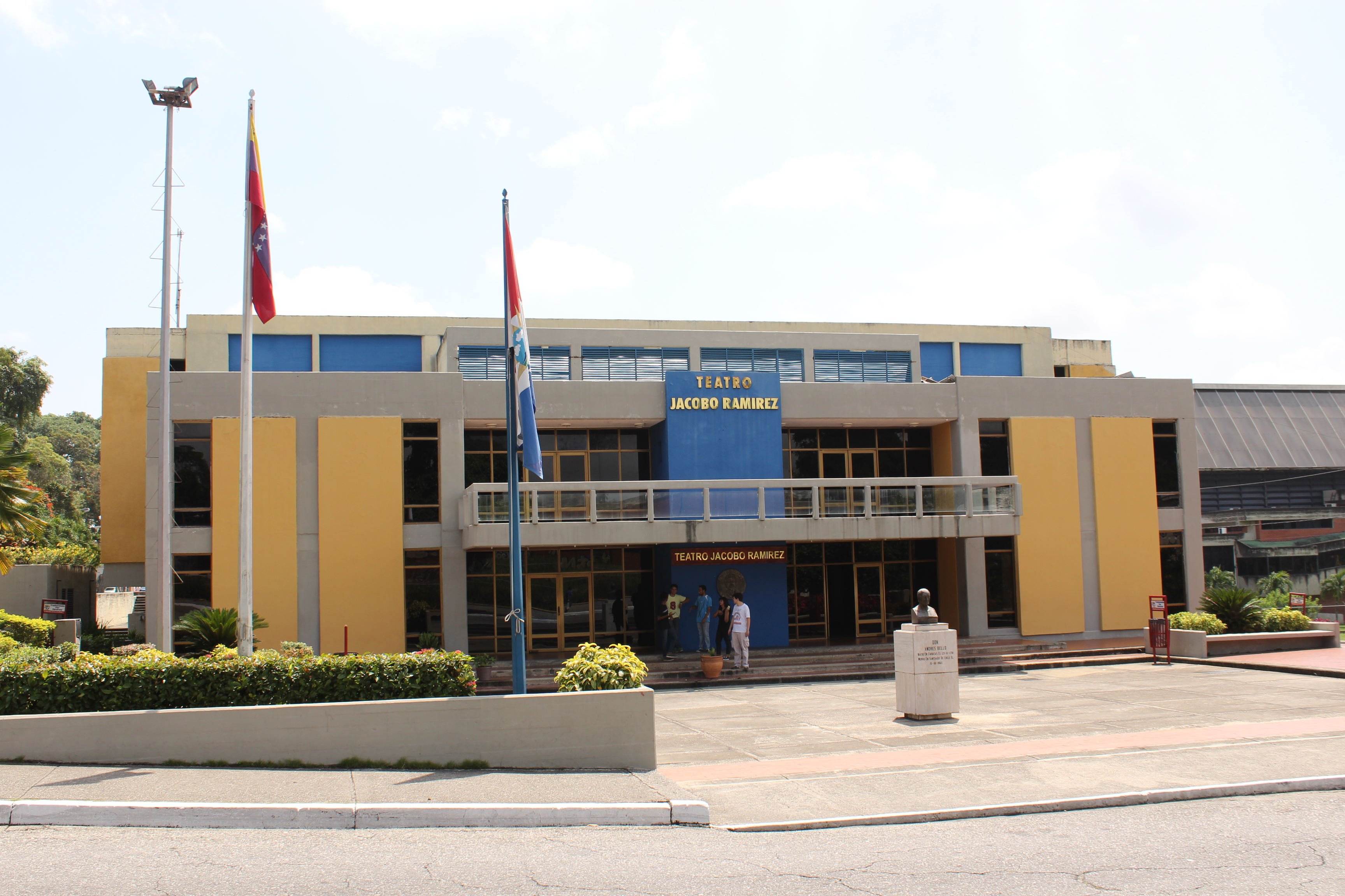 Teatro Jacobo Ramírez, San Felipe, Venezuela.